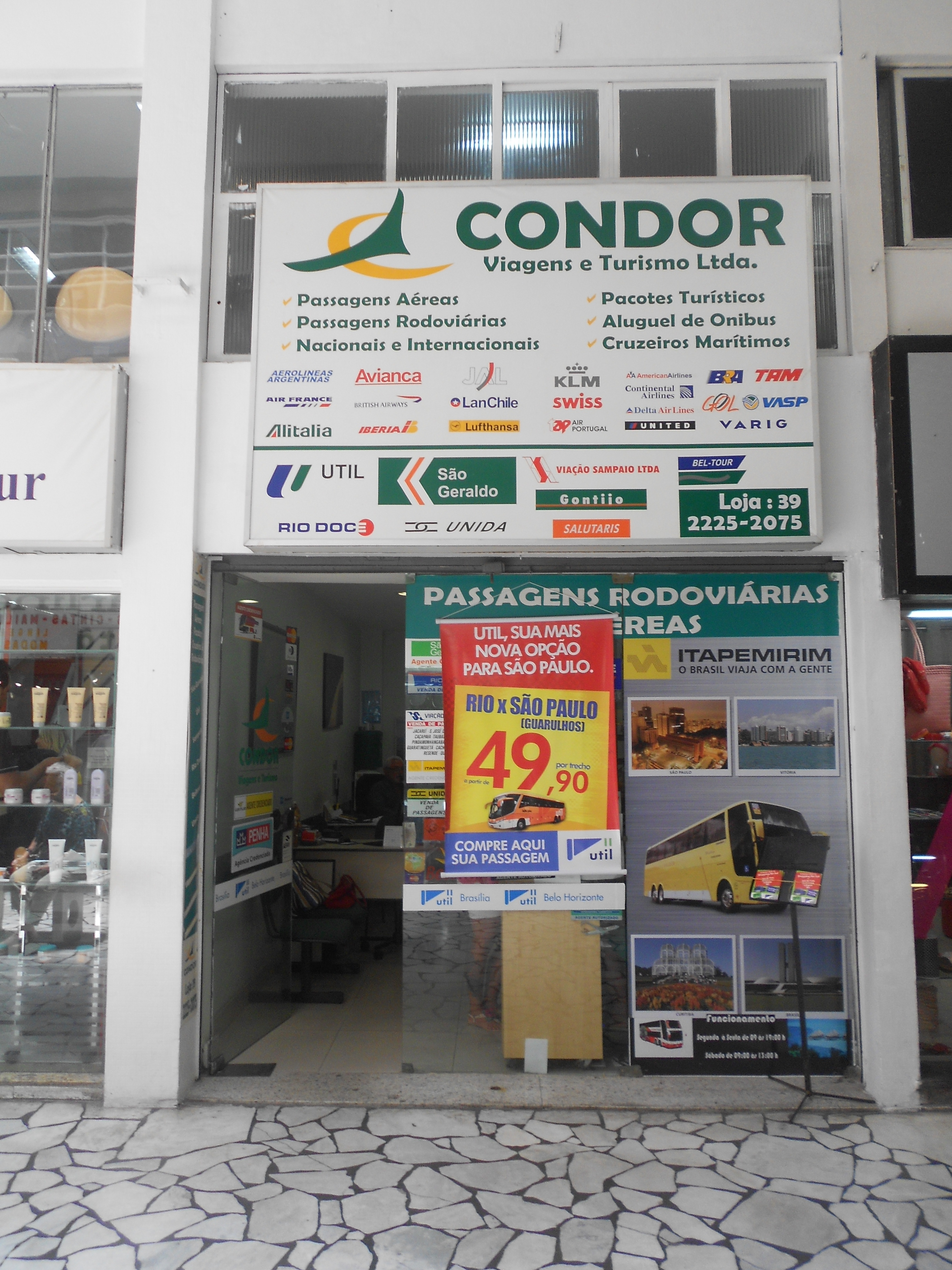 Condor Viagens & Turismo Ltda, situado na Galeria Condor, no Largo do Machado, Catete, Rio de Janeiro, Brasil.